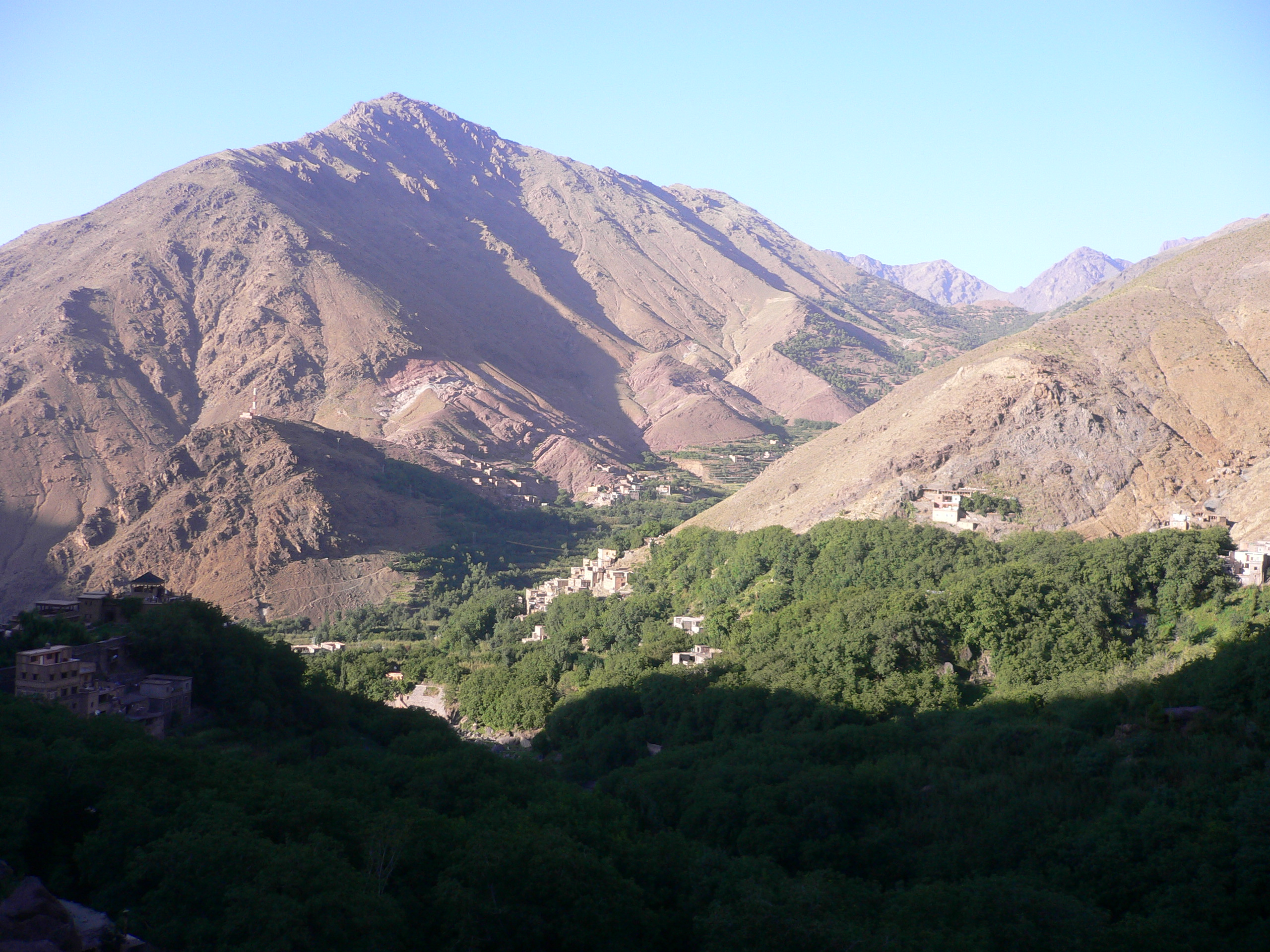 village d'Imlil (1800 m)